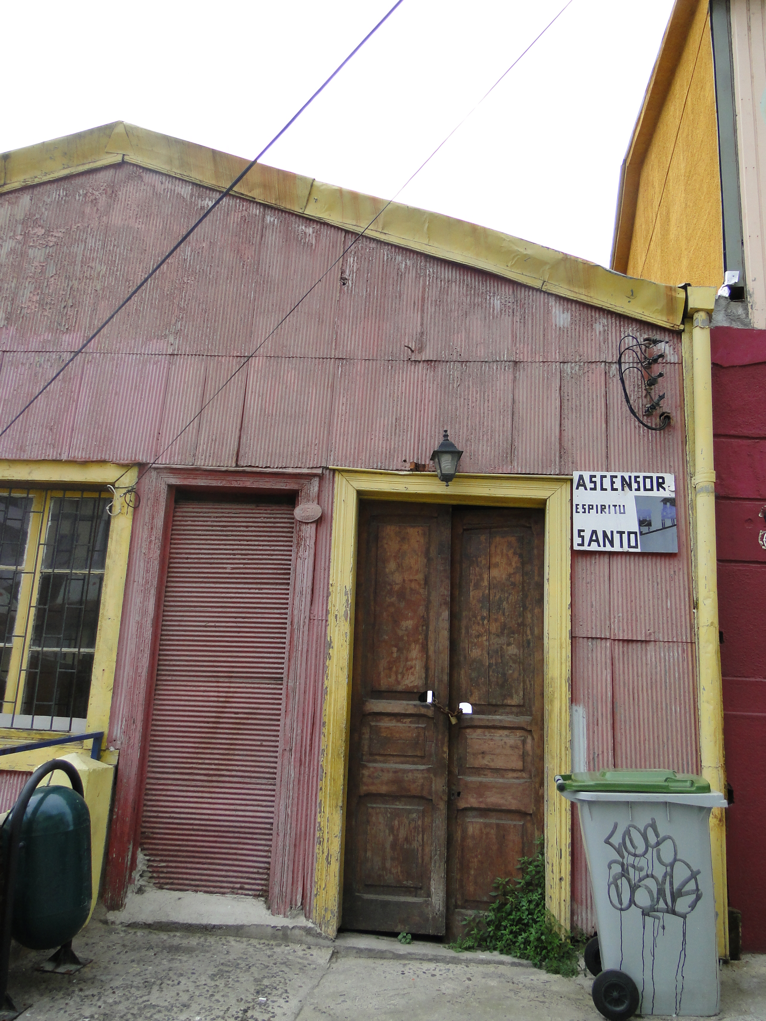 Ascensor Espíritu Santo This is a photo of a national monument in Chile: 777